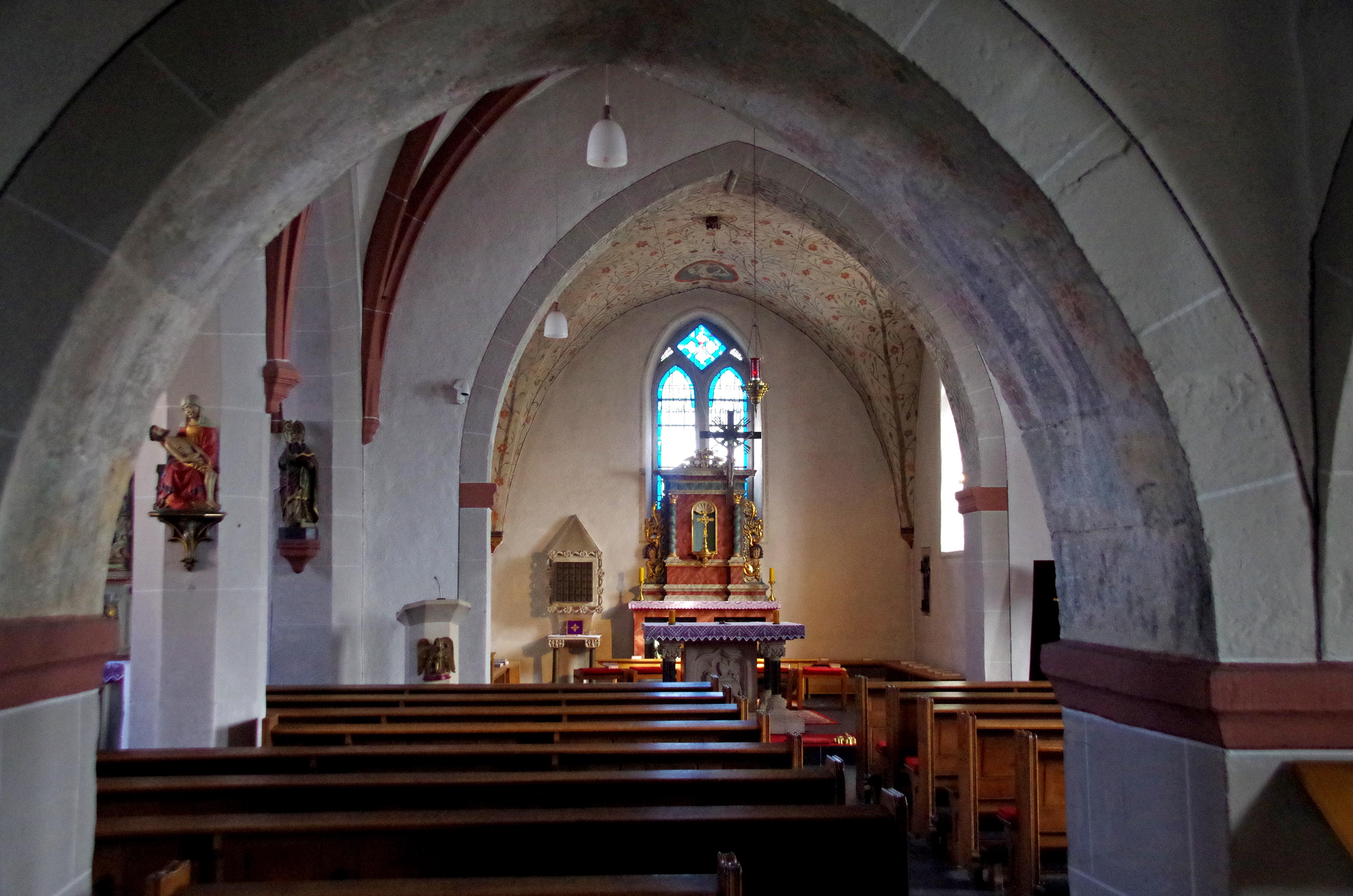 St. Kunibert (Sinzenich), mittleres Kirchenschiff